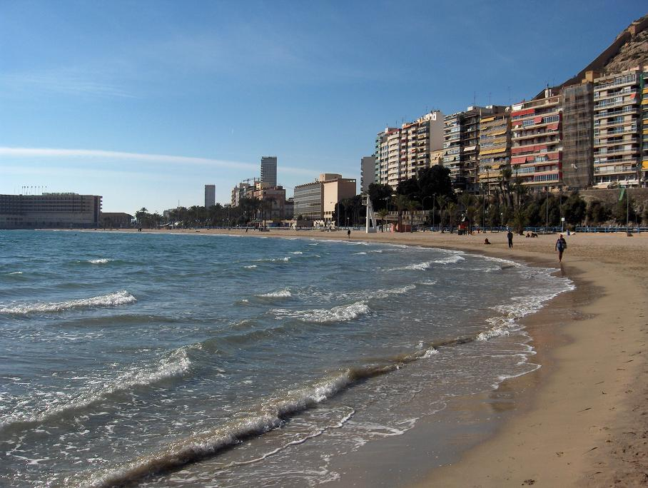 Playa el Postiguet, Alicante, España.